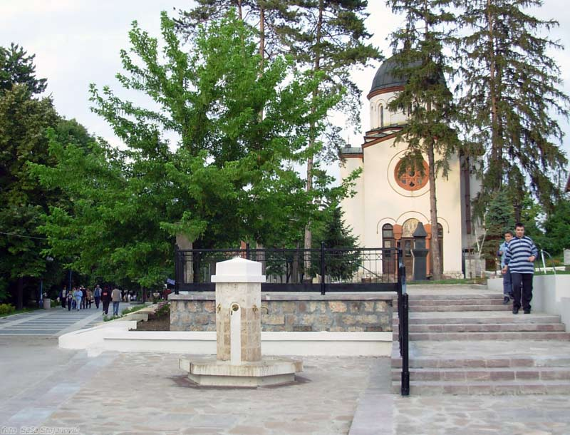 Трг испред цркве Св. Преображења. (Фото: Саша Стојановић) Licensing